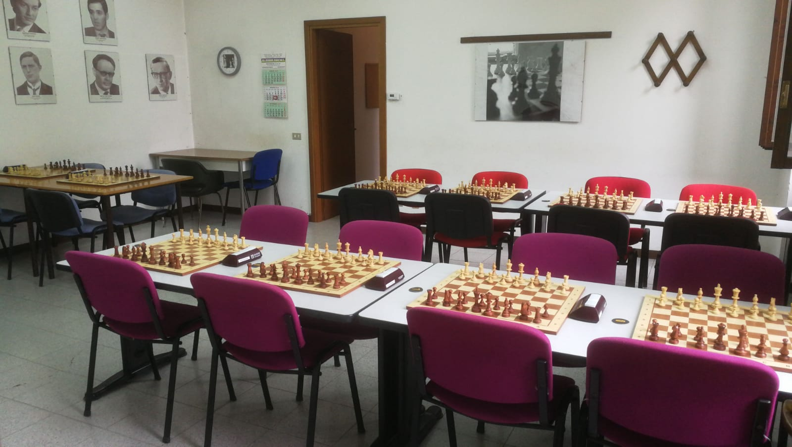 Sede del club, Circolo scacchistico Cavalli&Segugi